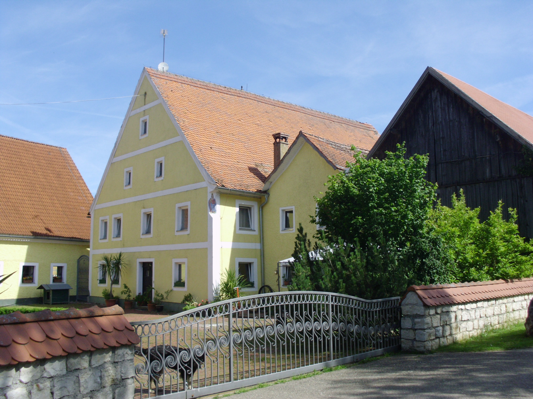 Die Hasenmühle, Ortsteil des Marktes Heidenheim im mittelfränkischen Landkreis Weißenburg-Gunzenhausen